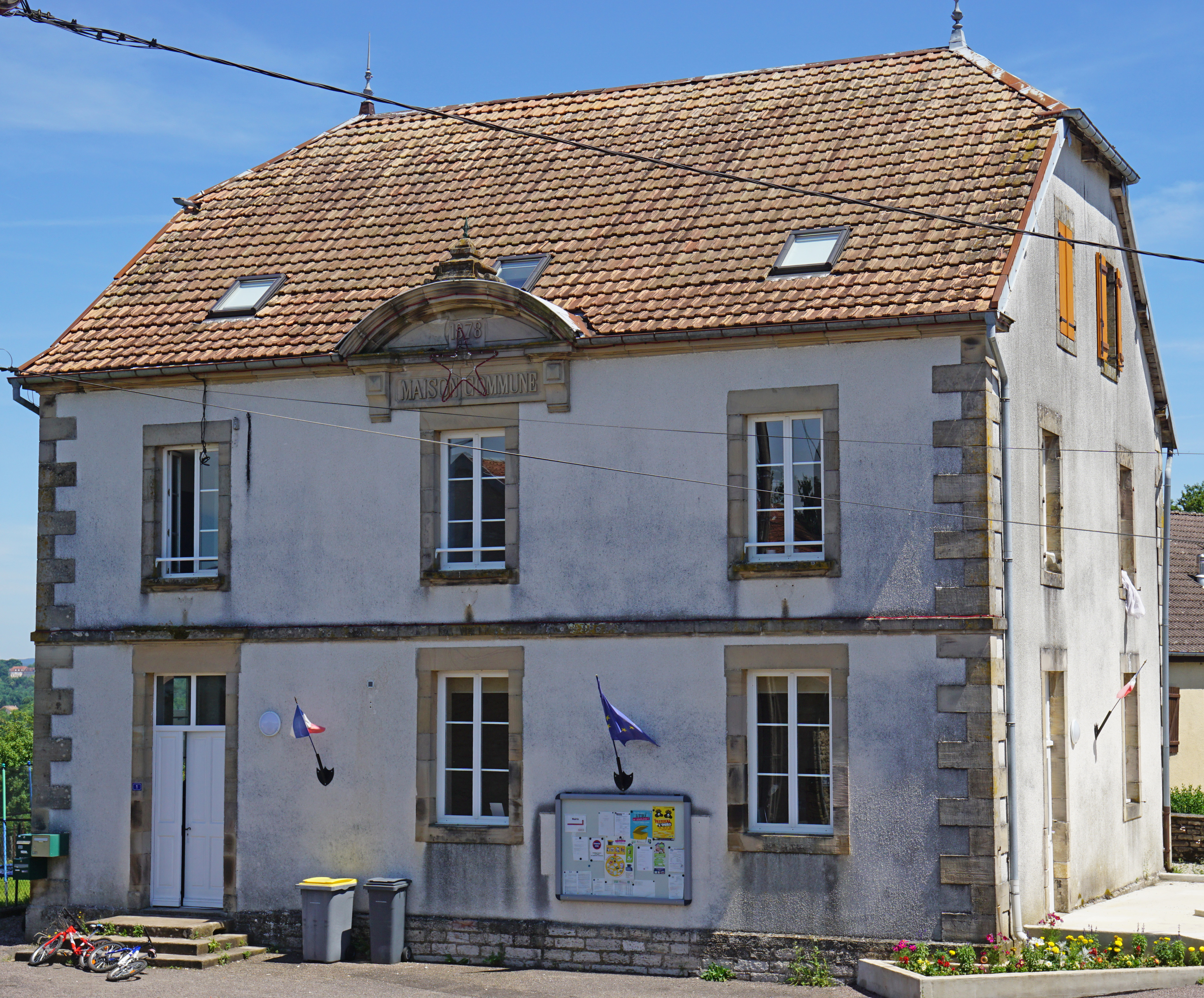 Mairie de Moimay.